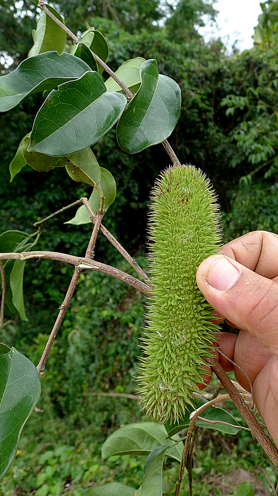 Bignonia sciuripabula (Bureau & K.Schum.) L.G. Lohmann